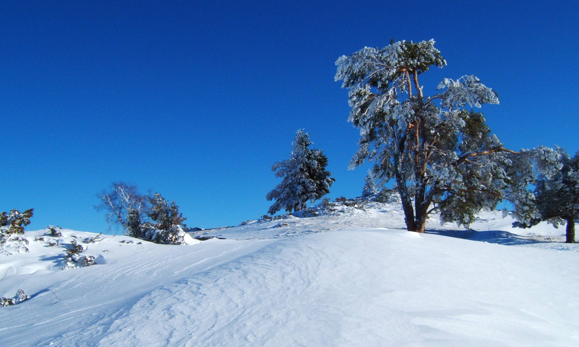 Station de ski de Camurac